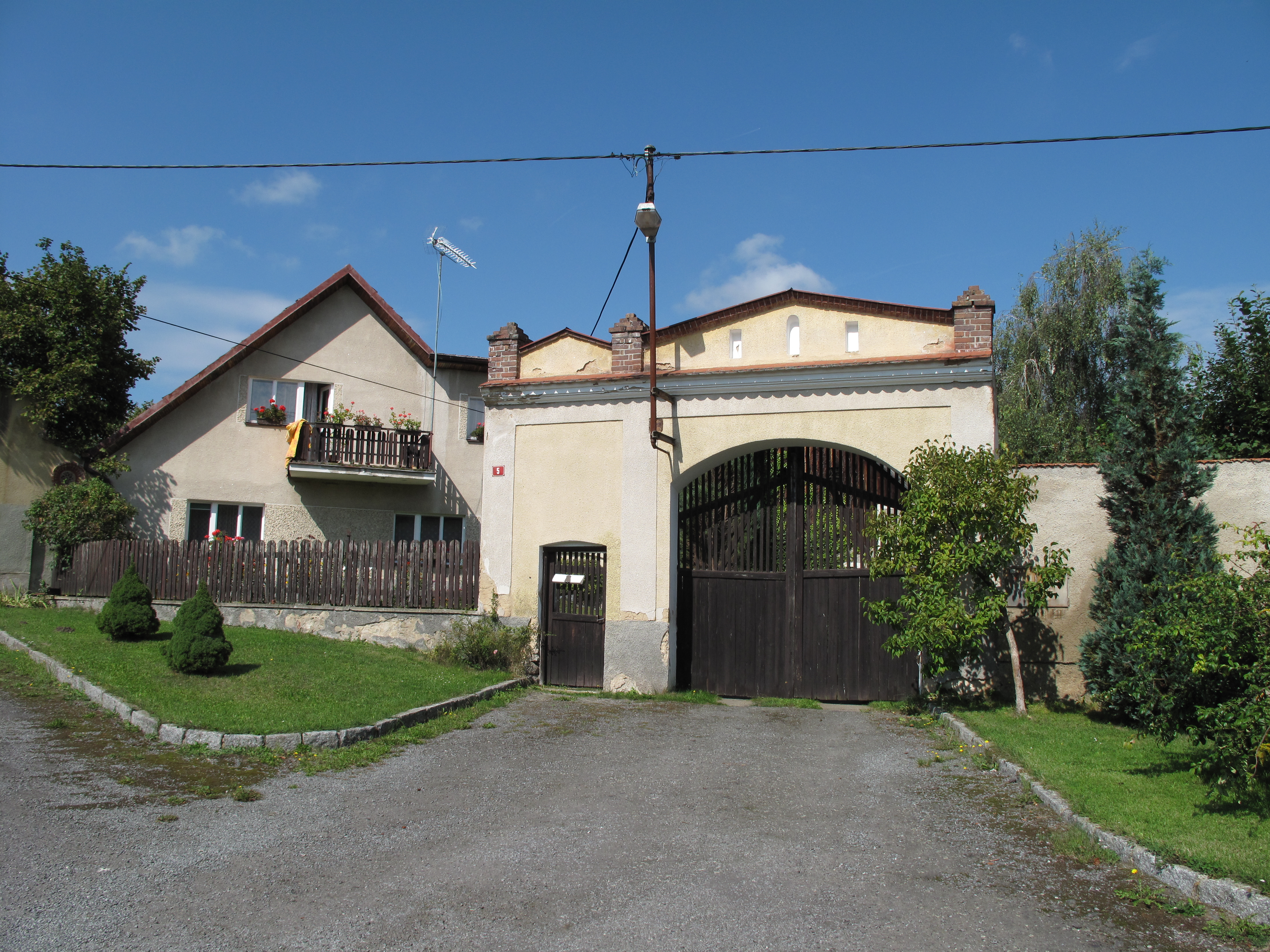 Vrata a dům v Maskovicích. Okres Benešov, Česká republika.